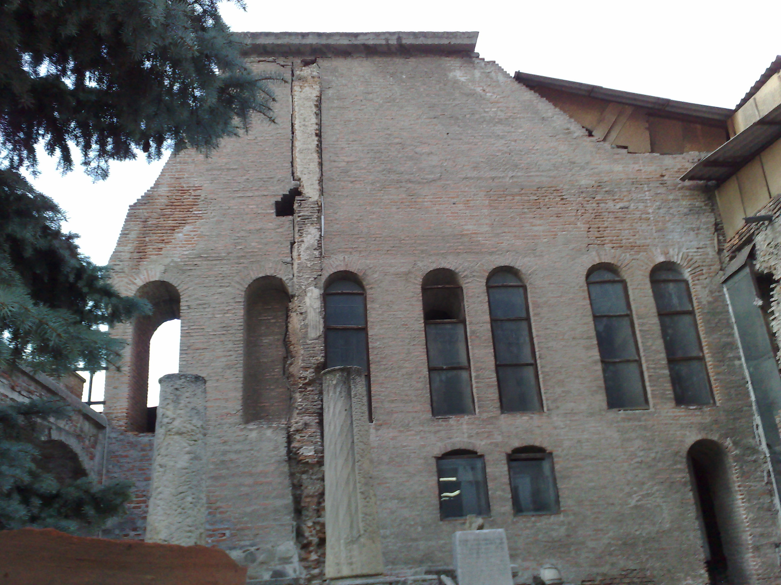 Ruinele Palatului domnesc